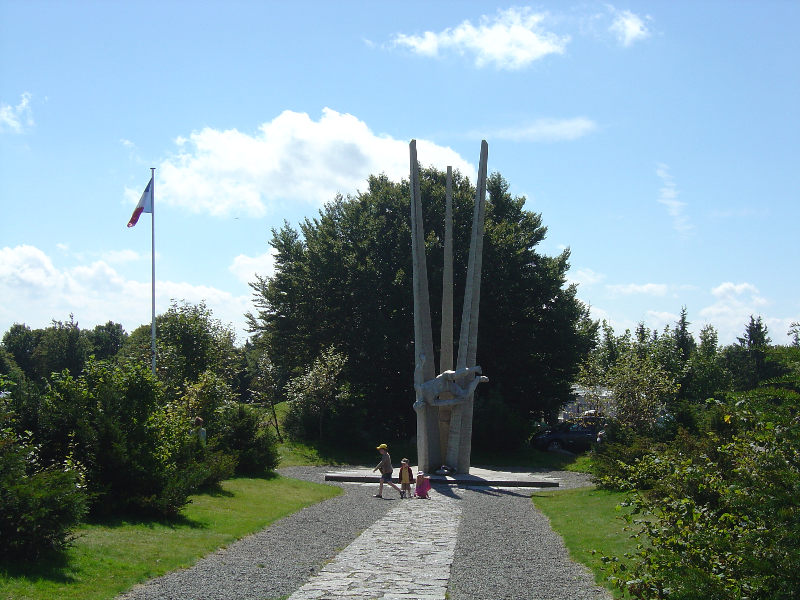 Le monument en mémoire des démineurs au Ballon d'Alsace. Implanté sur la ligne de séparation du département des Vosges (Commune de Saint Maurice sur Moselle) et celui du Territoire de Belfort (Commune de Lepuix-Gy)